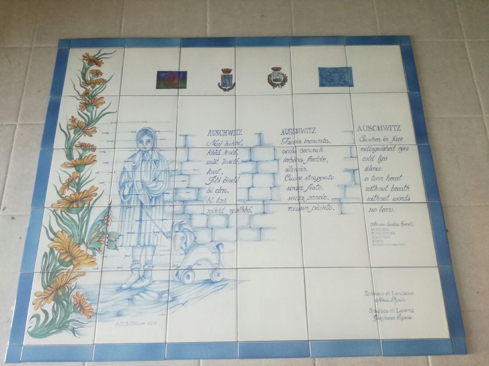 Una immagine della targa in majolica laertina donata dal Comune di Laterza ed ora affissa sul basamento del Monumento al Samudaripen dei Rom e Sinti, reca la poesia "Auschwitz" in tre lingue: Italiano, ronanì ed inglese